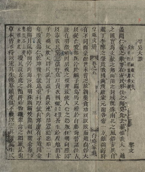 Binh Ngo Dai Cao (平吳大誥)